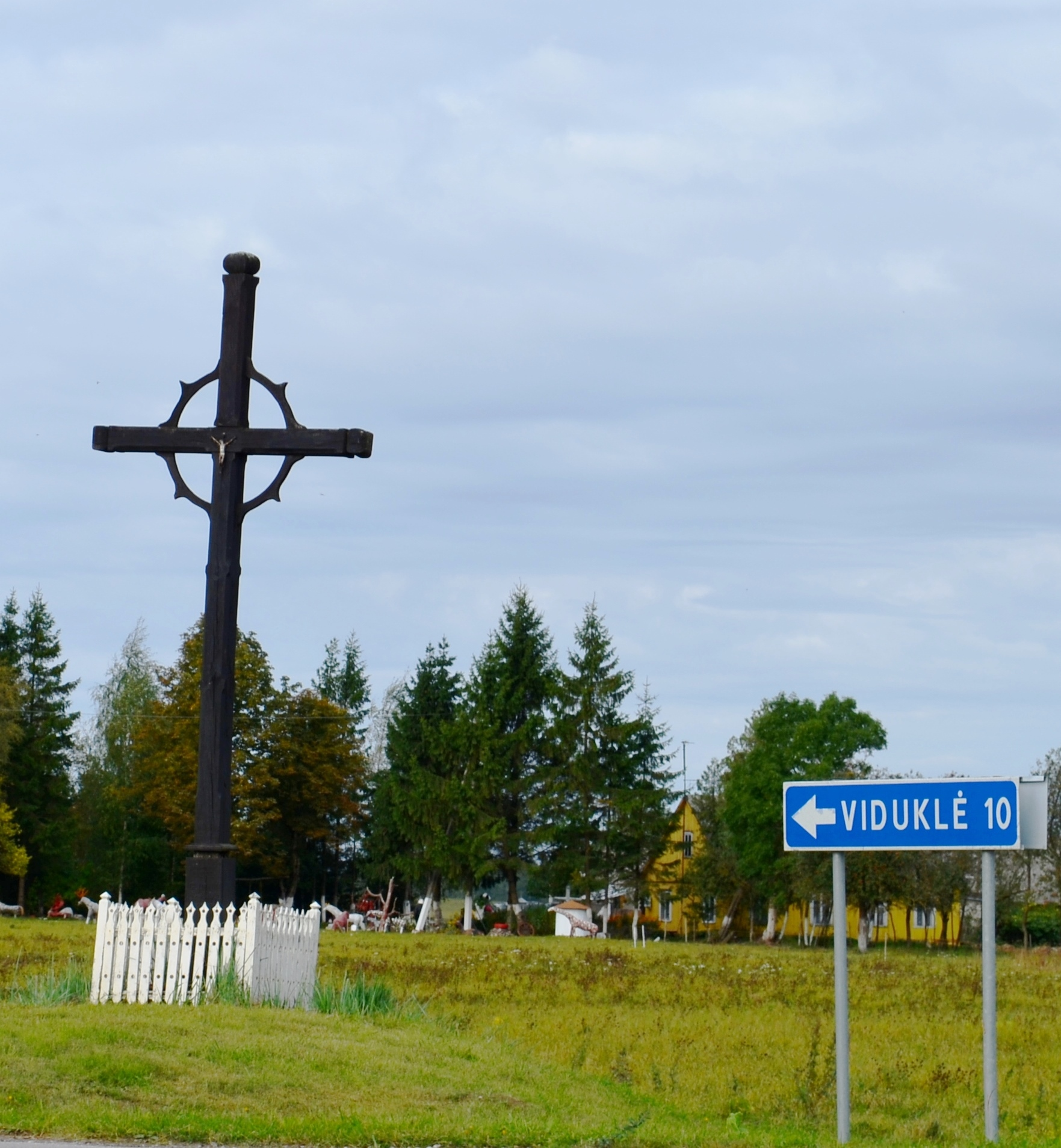 Kryžkelės kryžius, Šienlaukis, Raseinių raj.